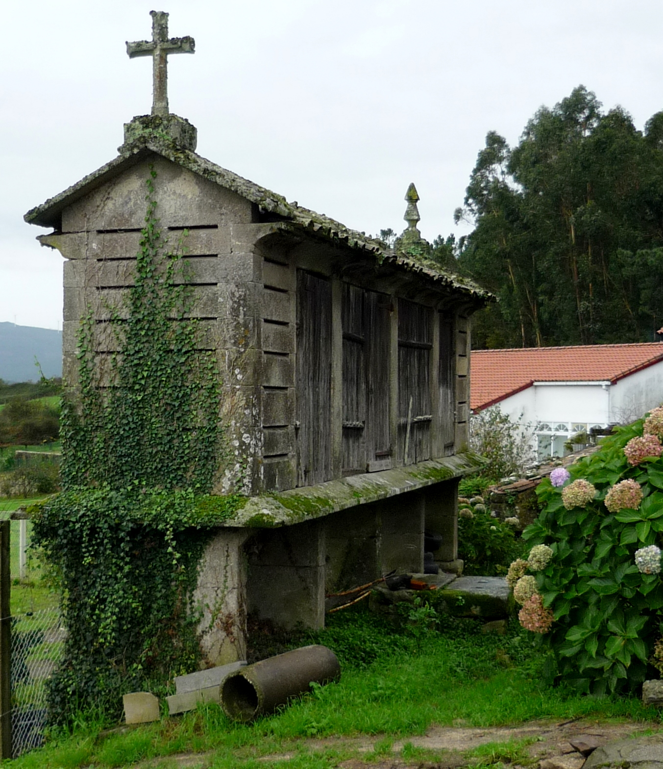 Hórreo con hedra en Laíño, Dodro